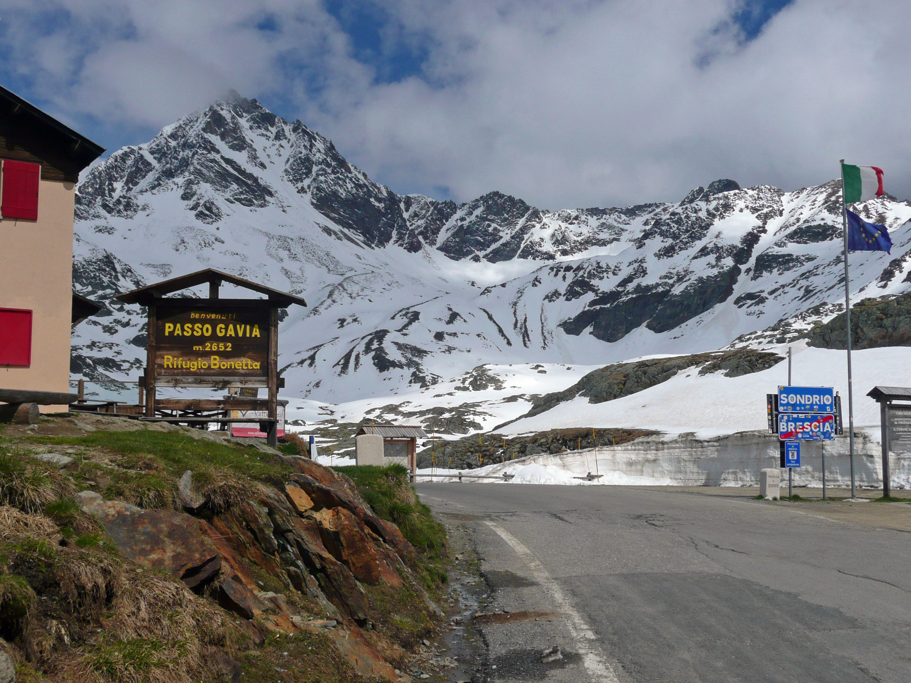 Passo di Gavia, Gaviapass, 2652 m. ü. NN., Rifugio Bonetta